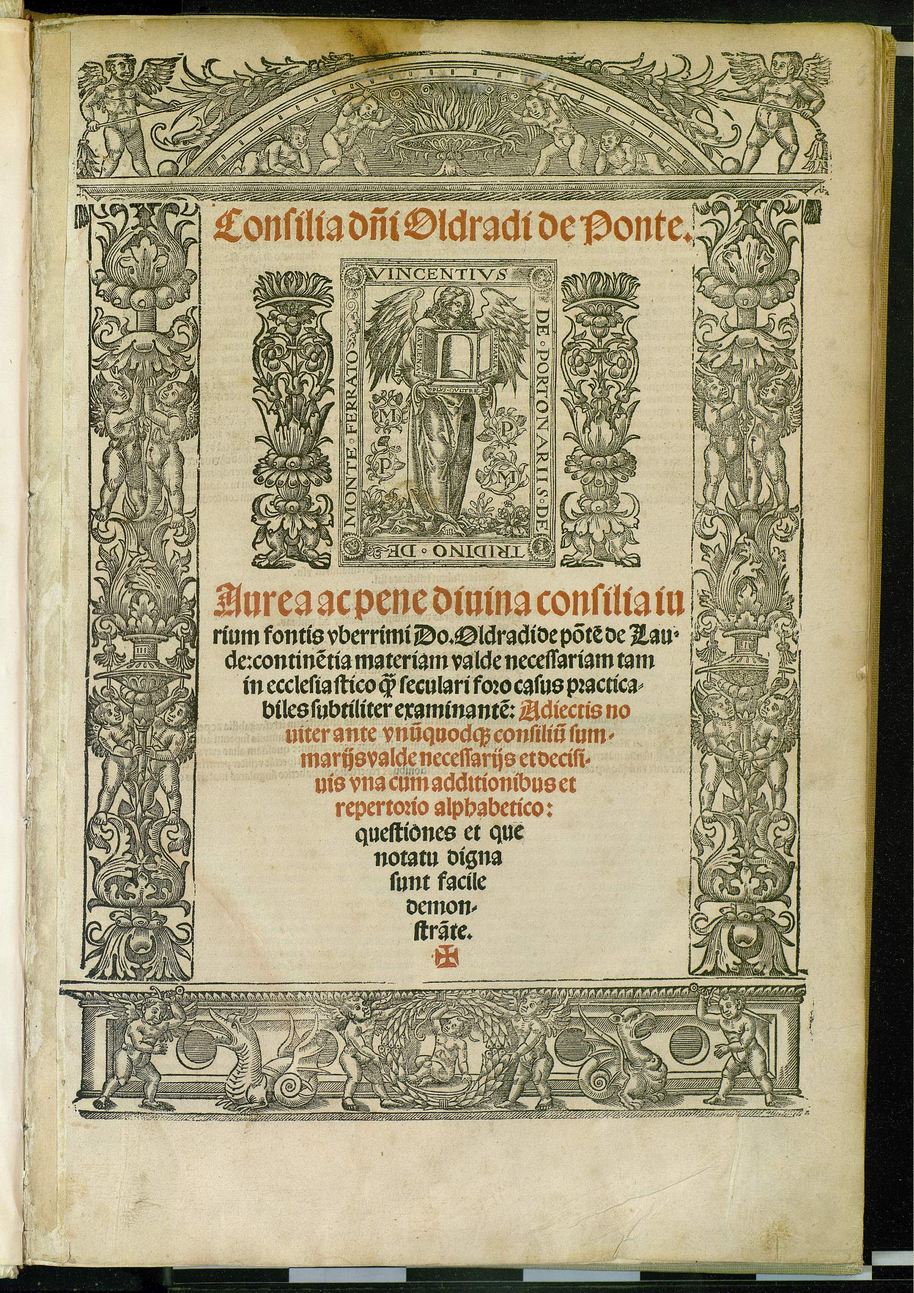 Frontespizio